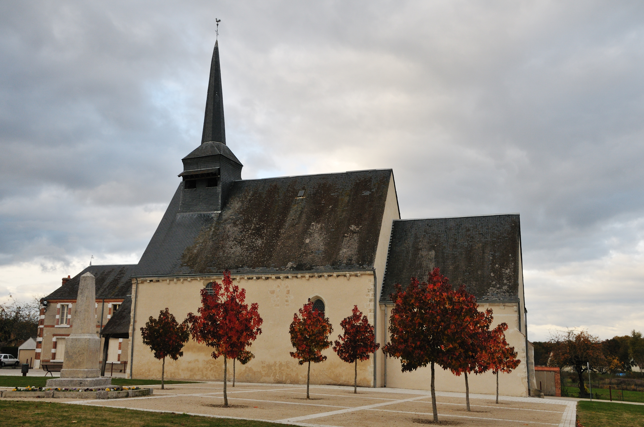 Église Saint-Laurian, Loreux, Loir-et-Cher, France